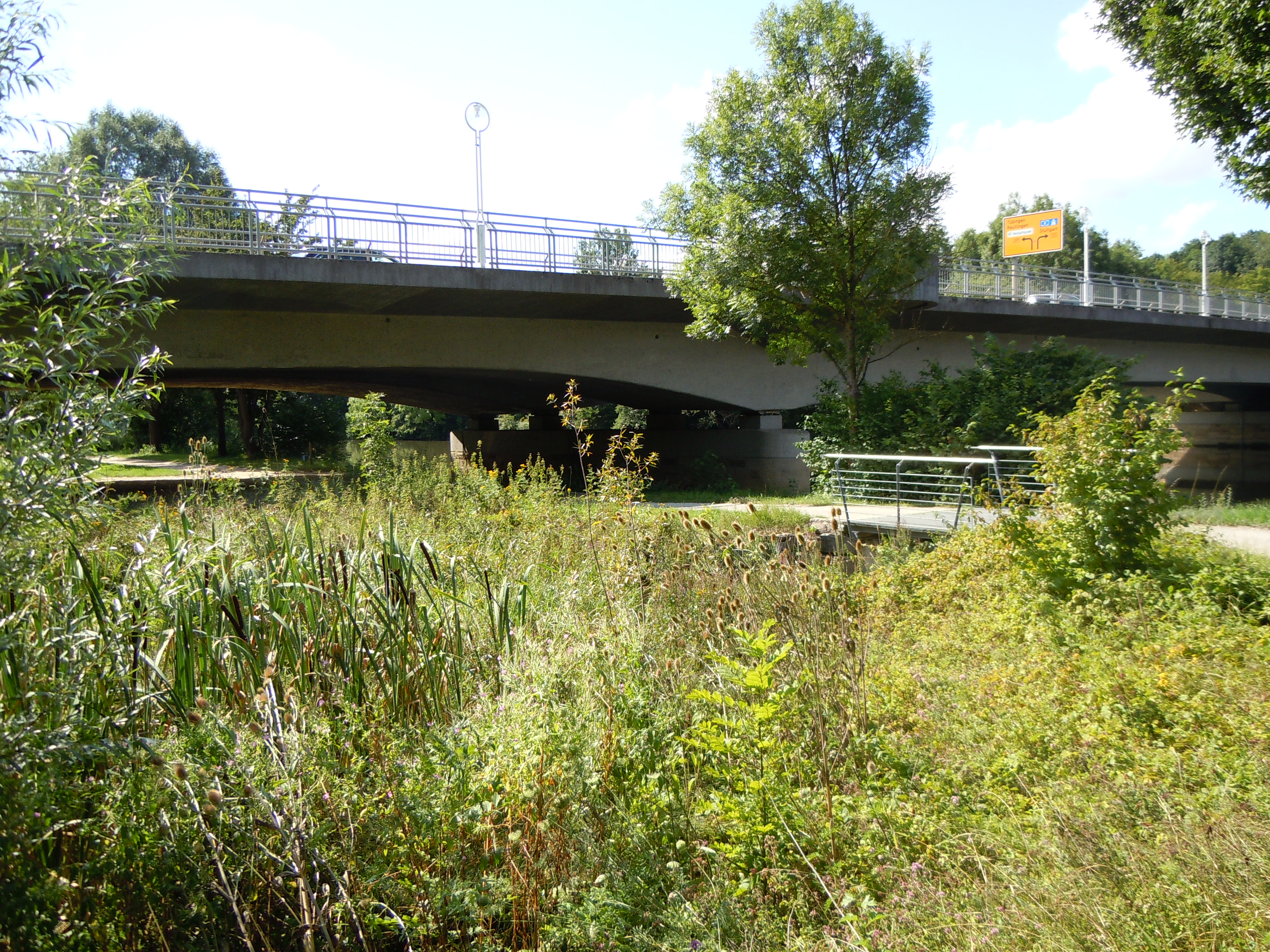 Mündungsbereich Seebach mit kleinem Feuchtgebiet und Steg. Im Hintergrund die Nürtinger Wörthbrücke.